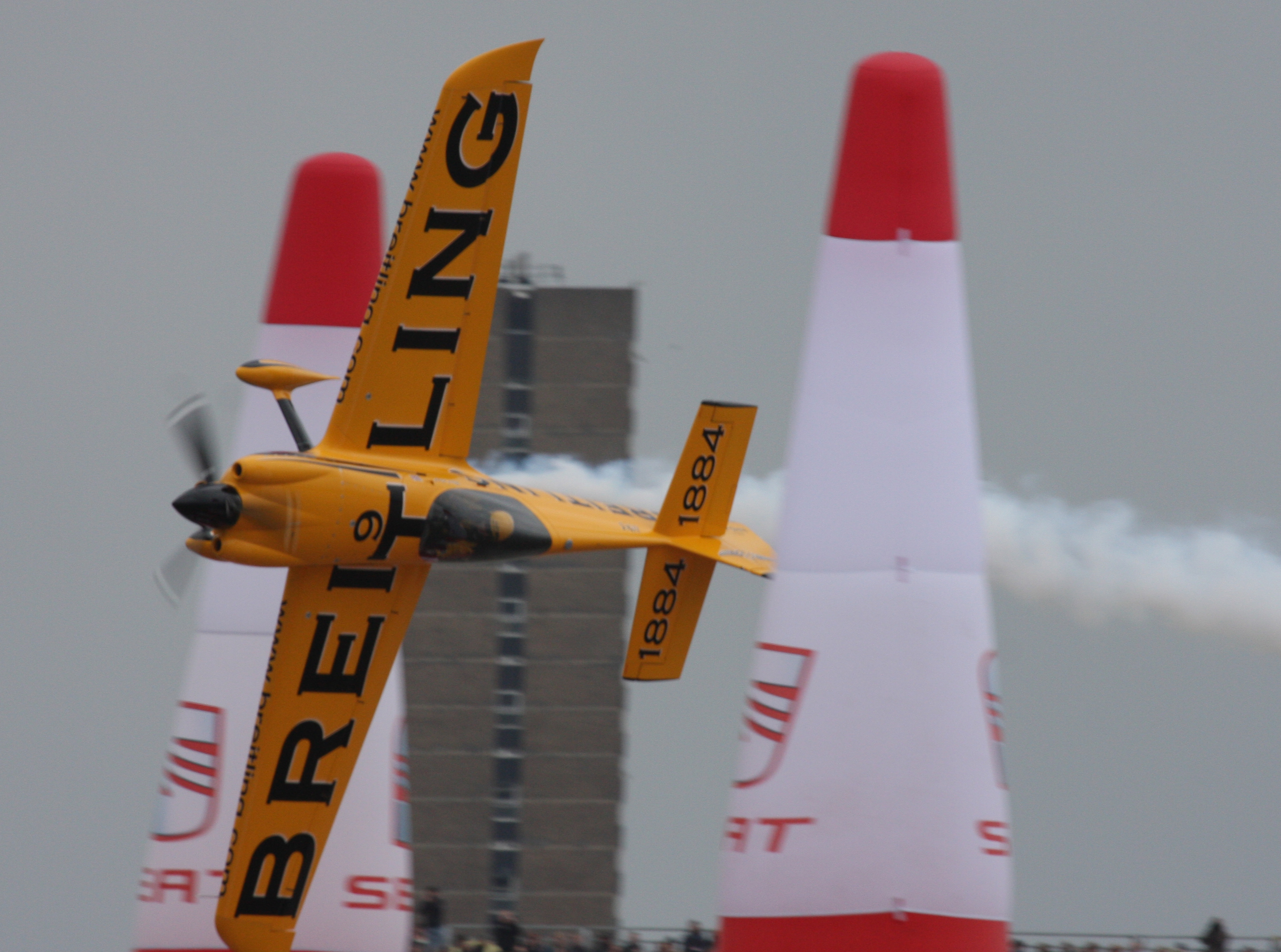 Nigel Lamb, MXS